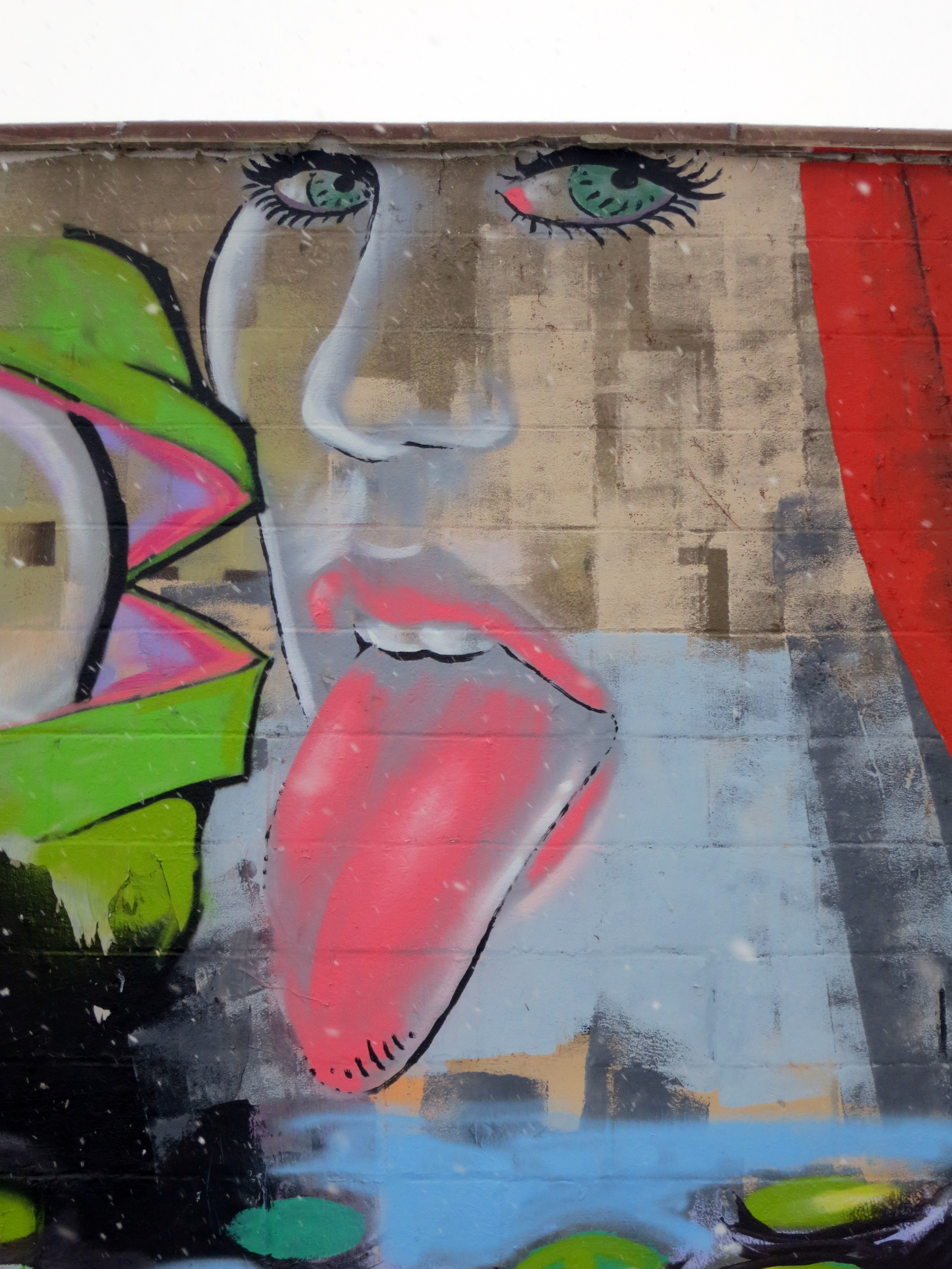 Graffiti de Miley Cyrus y su famosa lengua.